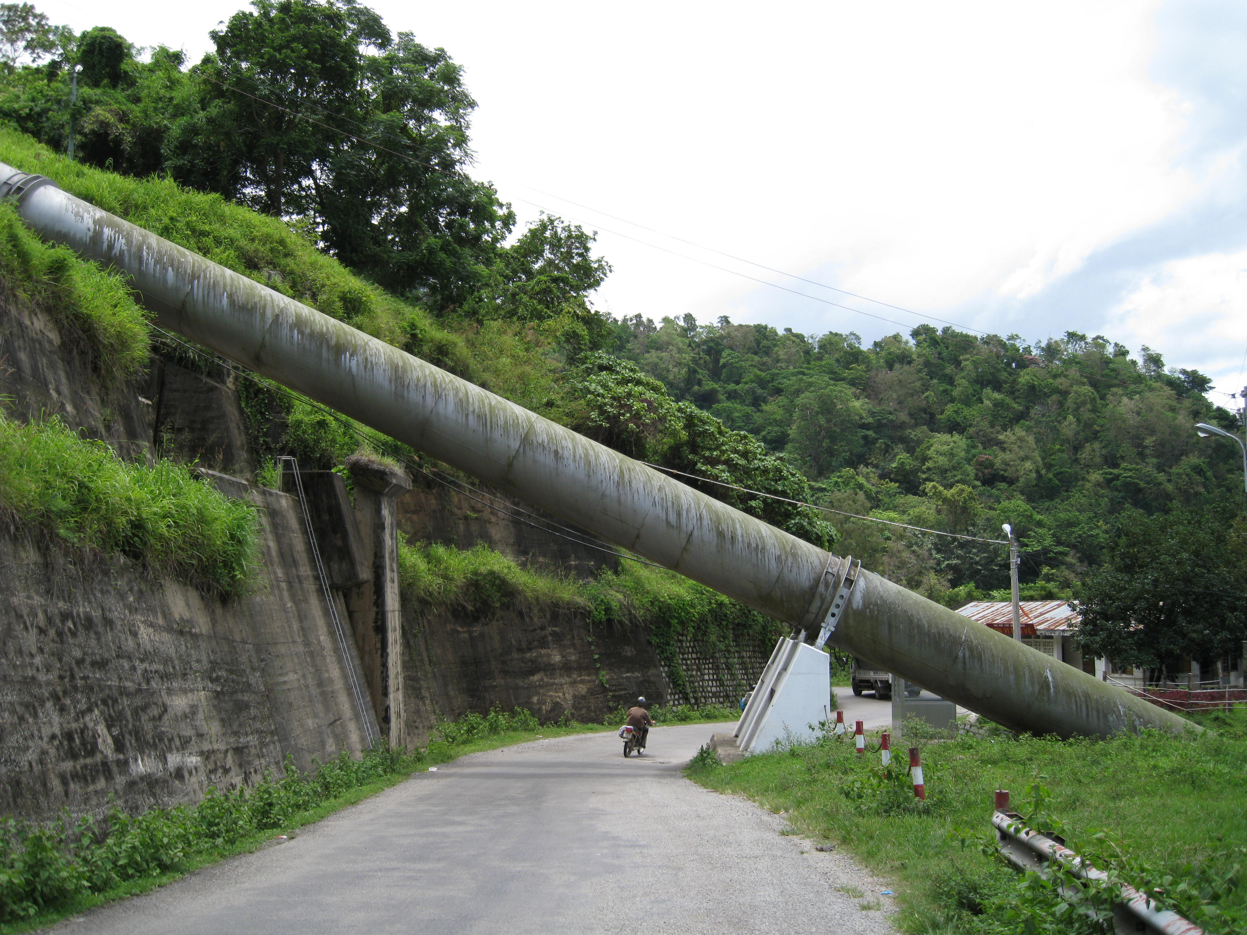 Hai ống cao áp bằng hợp kim của nhà máy thủy điện Đa Nhim.